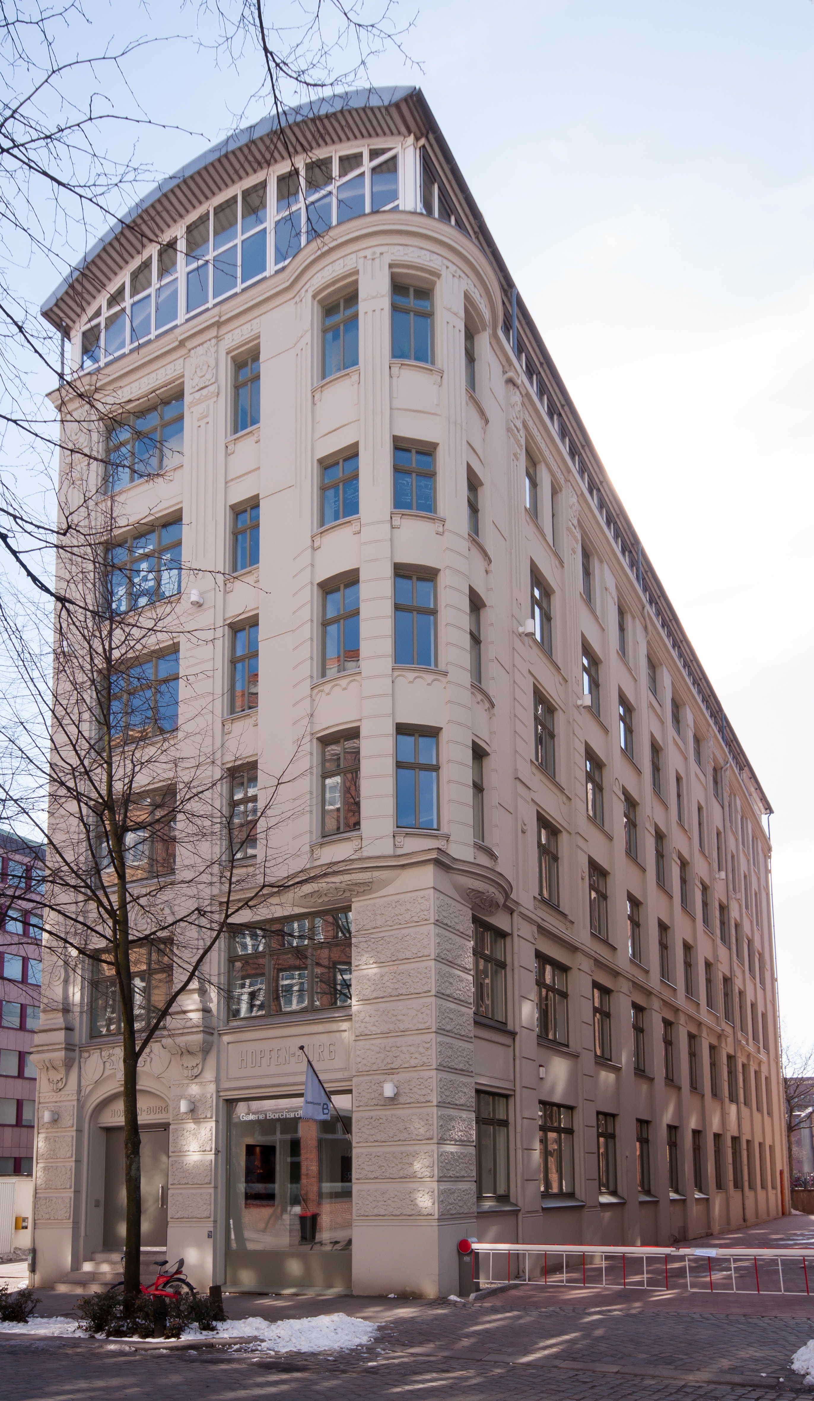 Kontorhaus Hopfensack 19 (Hopfenburg) in Hamburg-Altstadt. This is a photograph of an architectural monument.